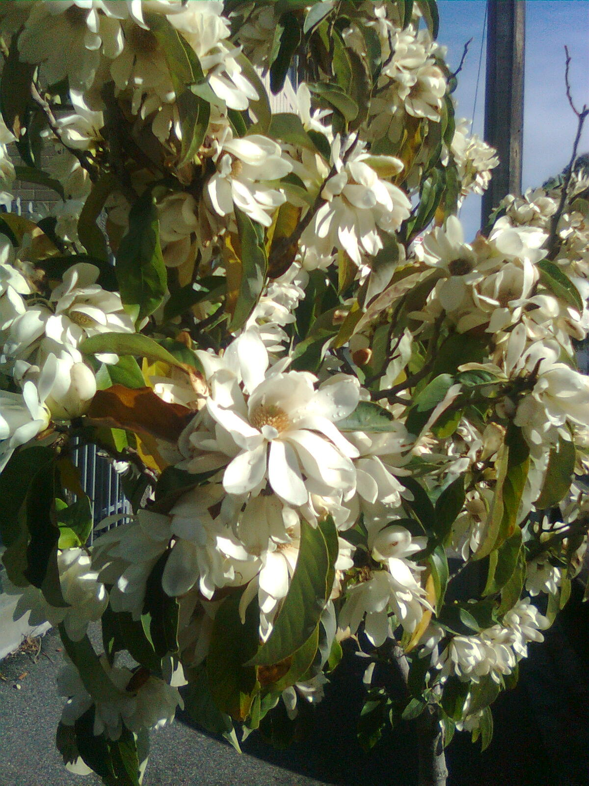 अनंत वृक्ष झुडूप स्वरूपात. हिवाळ्यात जुलै महिन्यात मेलबर्न येथे फुललेला वृक्ष. दुपारची वेळ असून तापमान सुमारे १० अंश होते.